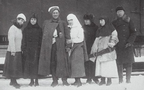 „Ühistöö“ meditsiini- ja toitlustuspunkti personal koos haavatuga. Paremal [punkti juhataja sõjaväeametnik Artur] Klimberg.